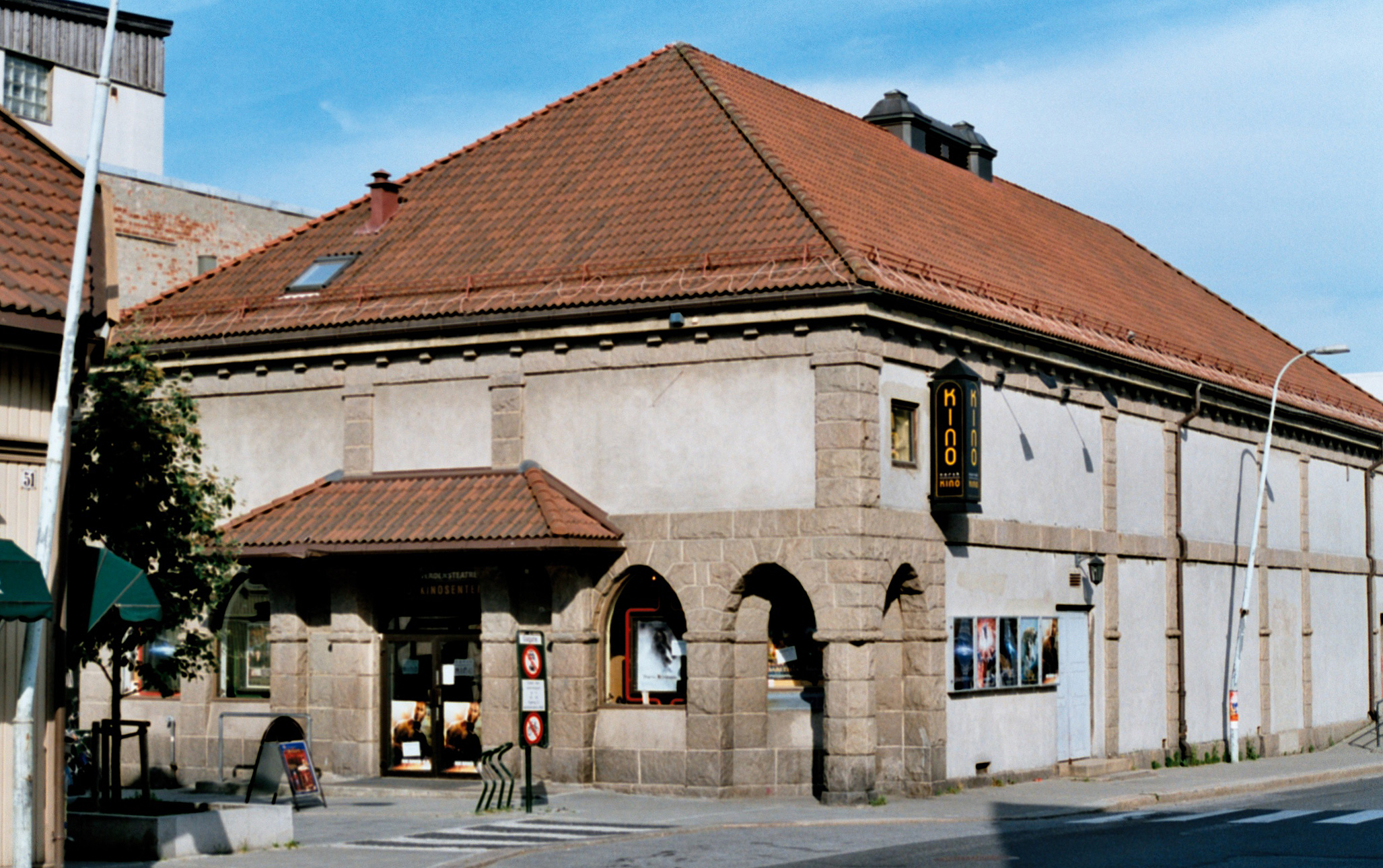 Sarpsborg cinema (Verdensteateret), Norway.